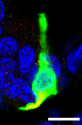 Figura 3. La ultraestructura revela un proceso axonal de la célula L, escoltado por la glía entérica. B) Se observa aspecto de botella característico de la célula L. Neurofilamentos livianos están contenidos dentro del proceso basal de una célula Pyy-GFP. Barra 10μm. Microscopía confocal.